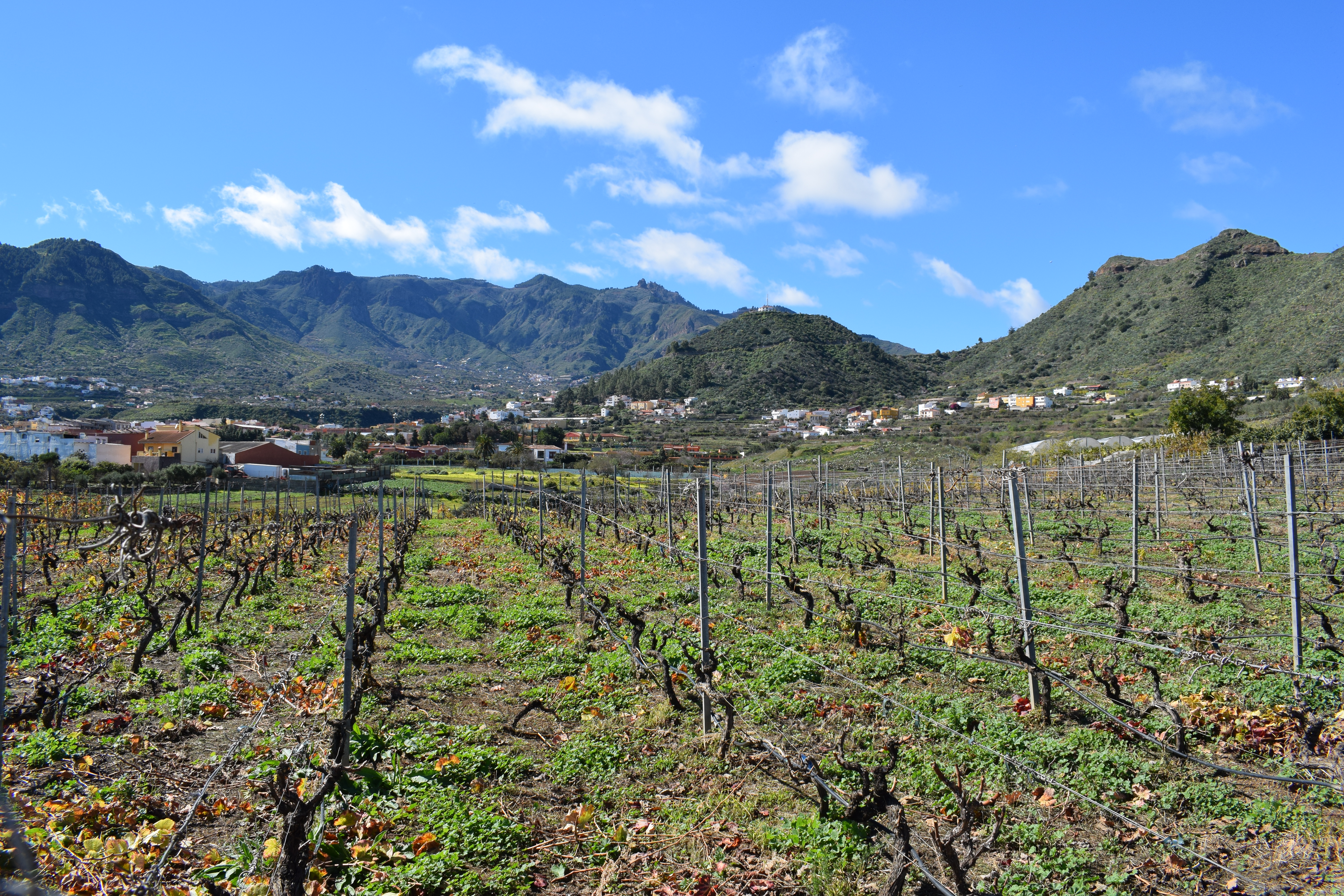 Vignoble à Valsequillo, Grande Canarie